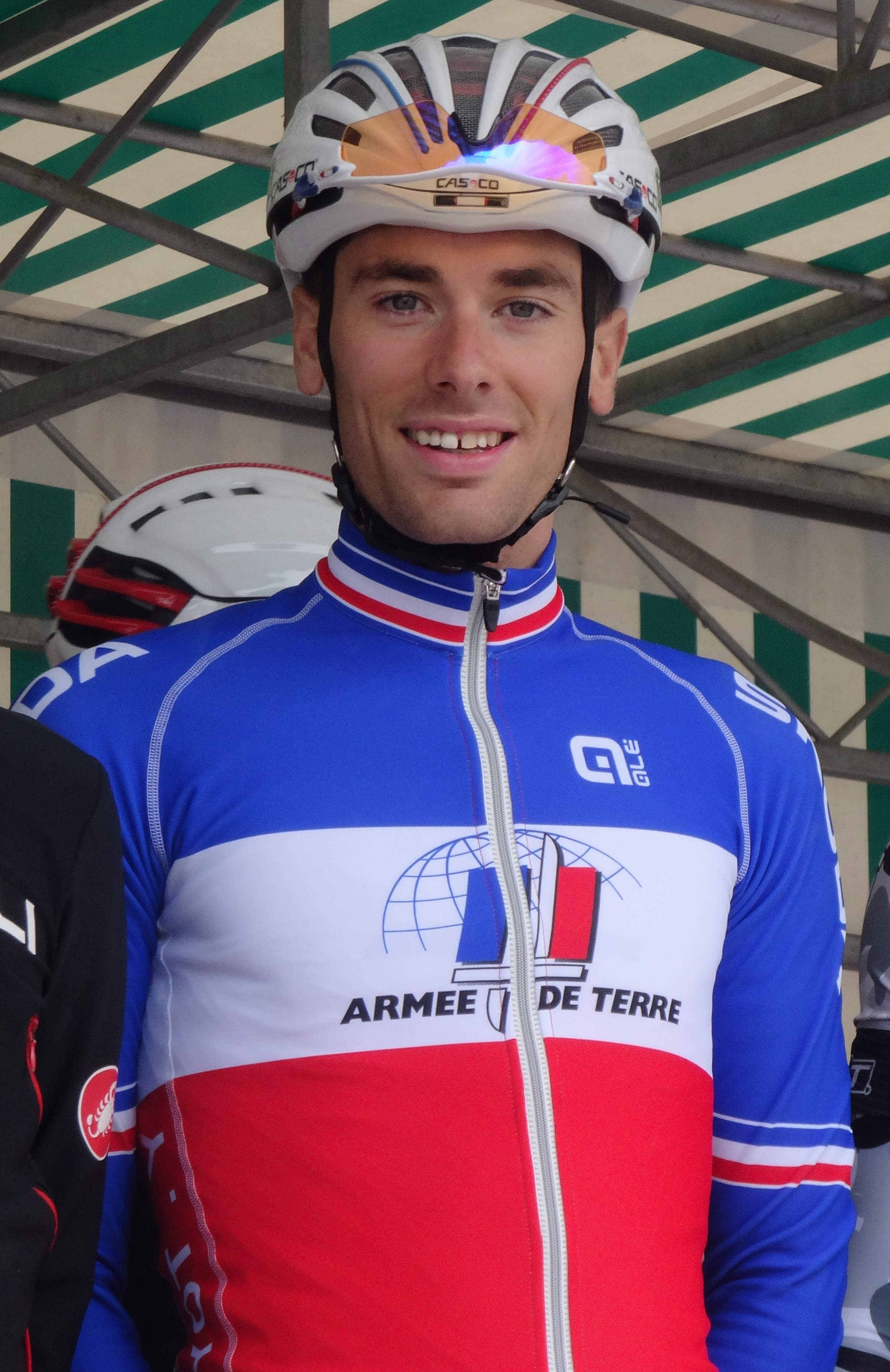 Reportage photographique réalisé le dimanche 17 août à l'occasion du départ et de l'arrivée du Grand Prix de Bavay 2014 à Bavay, Nord, Nord-Pas-de-Calais, France.